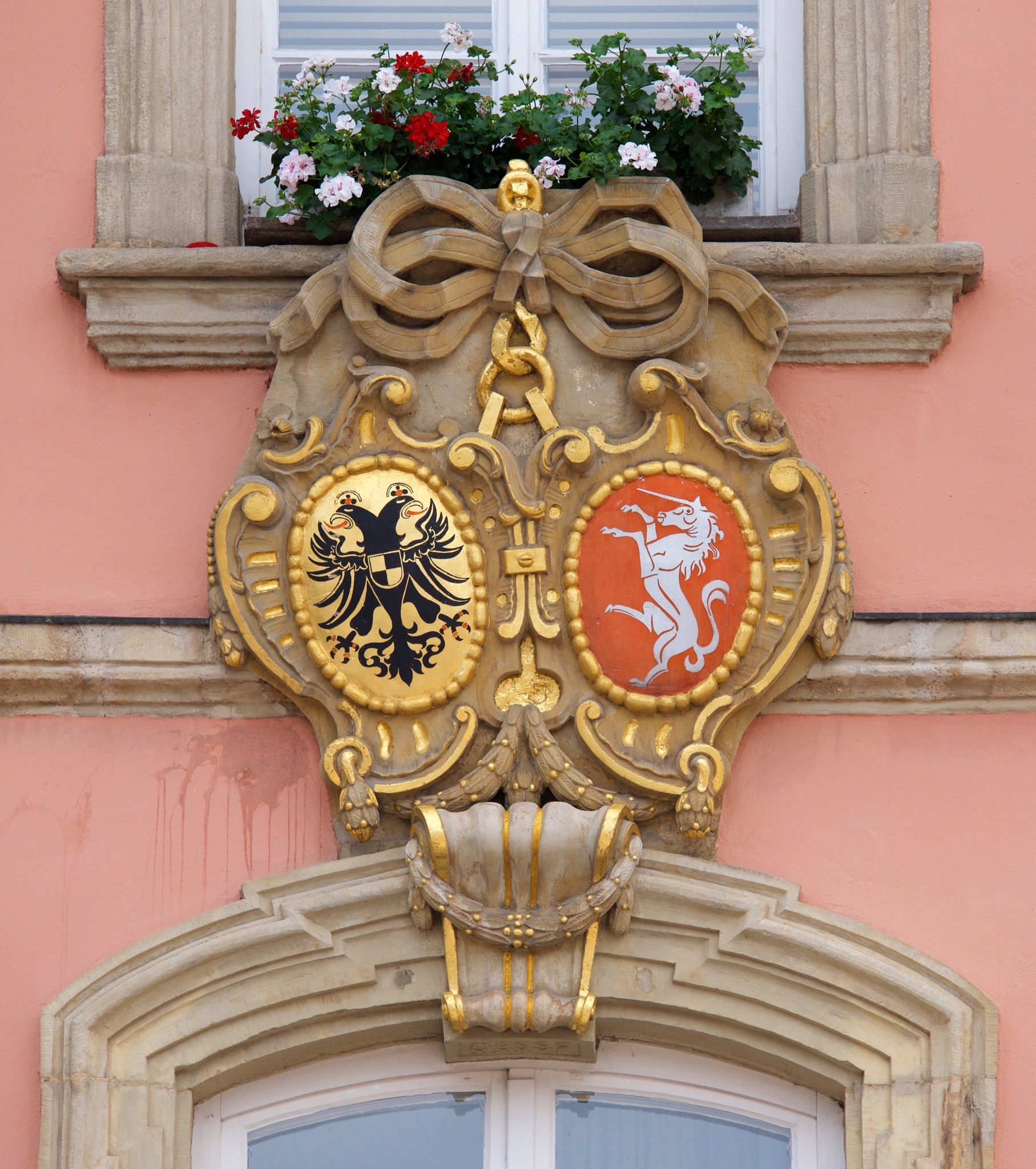 Doppelwappen am Rathaus (Reichswappen und Stadtwappen mit dem Einhorn)